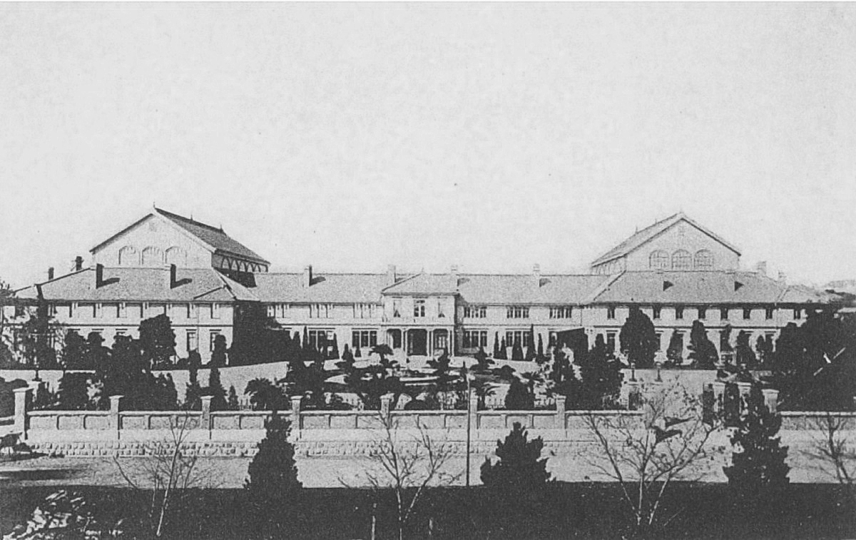 The First Japnese Diet Hall (1890-91)